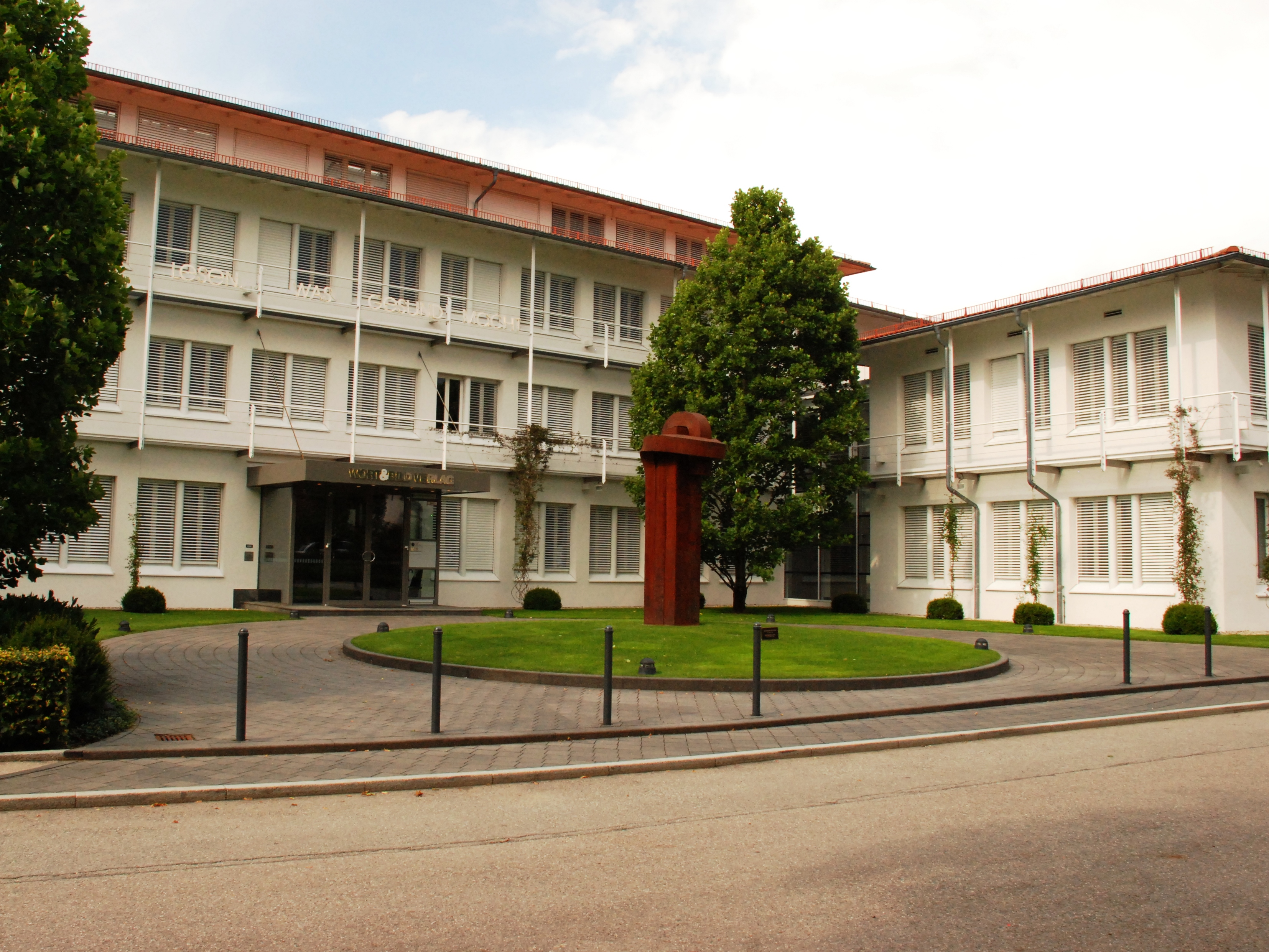 Gebäude des Verlags Wort & Bild in der Burgstraße 1 in Baierbrunn, Landkreis München, Bezirk Oberbayern, Bayern. In der Bildmitte Skulptur „Besarkada XV“ des Bildhauers Eduardo Chillida. Foto gemäß den Voraussetzungen zur Panoramafreiheit von öffentlicher Verkehrsfläche aus aufgenommen.